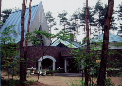 Azumino Jansem Museum, Nagano, Japan